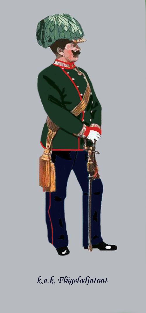 k.u.k. Flügeladjutant